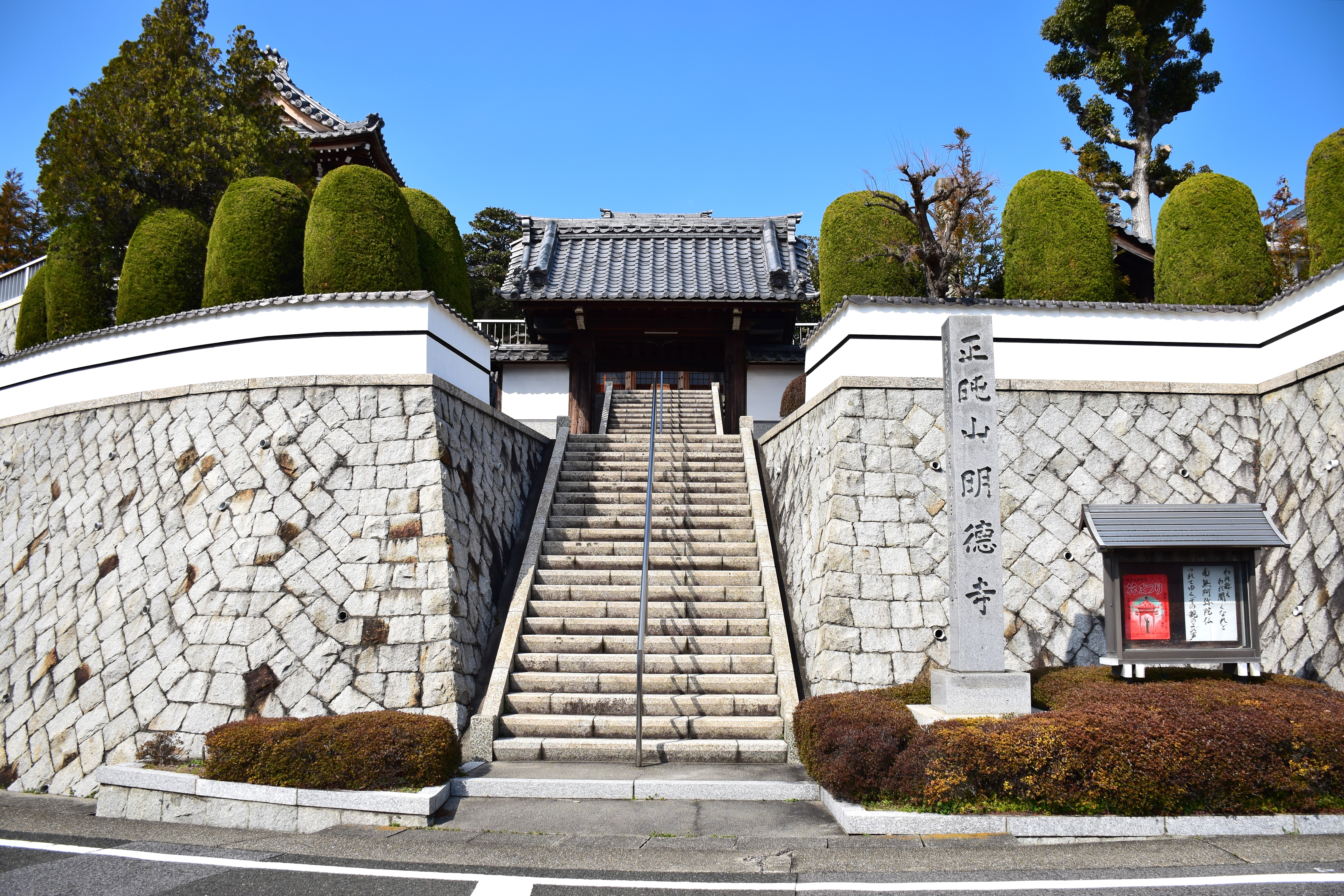 明徳寺山門